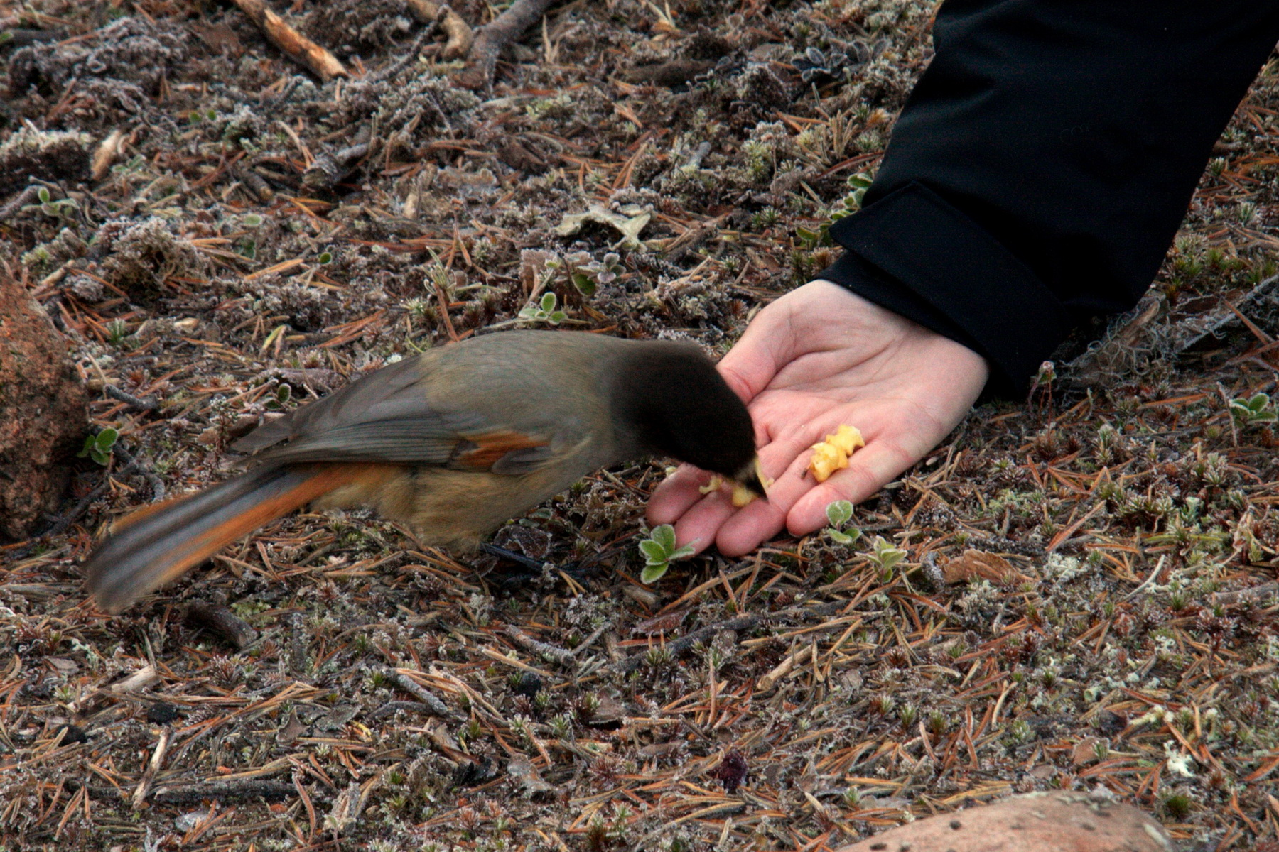 Un gaig siberià (Perisoreus infaustus) als boscos del nord de Jukkasjärvi. Hores de perseverança varen permetre que es decidís a baixar a menjar de la mà.